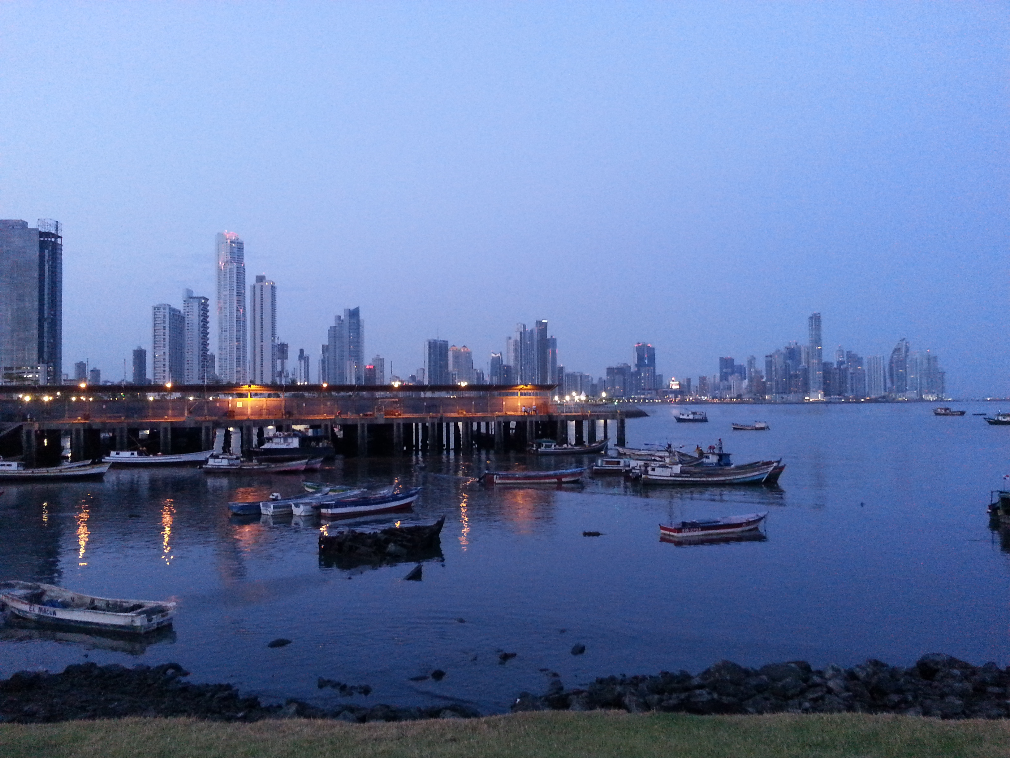 Atardecer en la ciudad de Panamá.